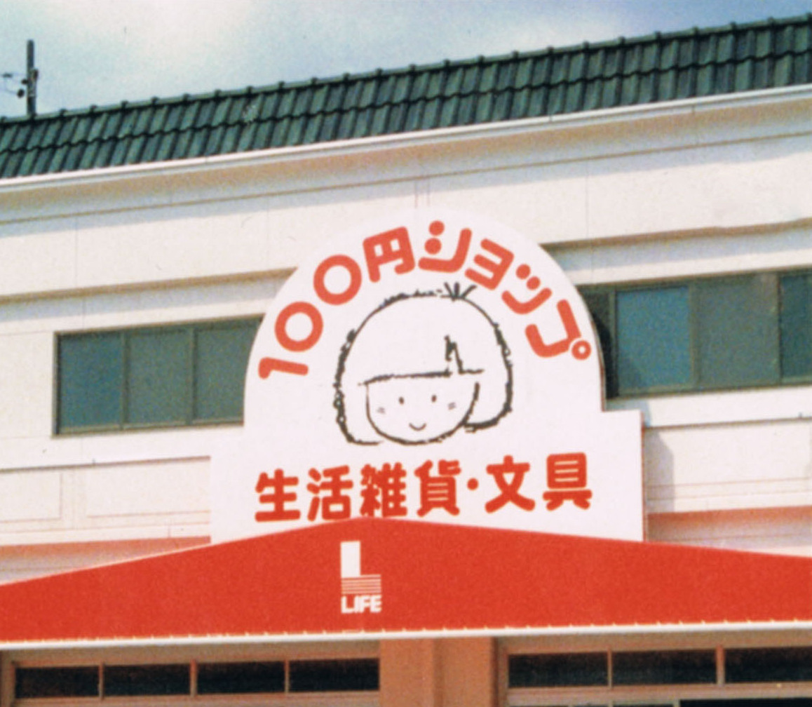 日本発の１００円ショップ